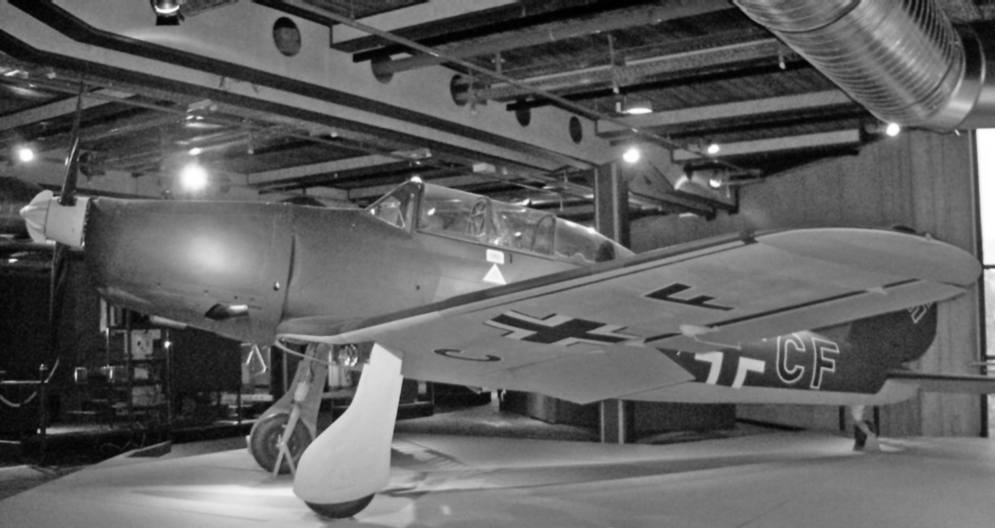 Arado Ar 96 B-1 01